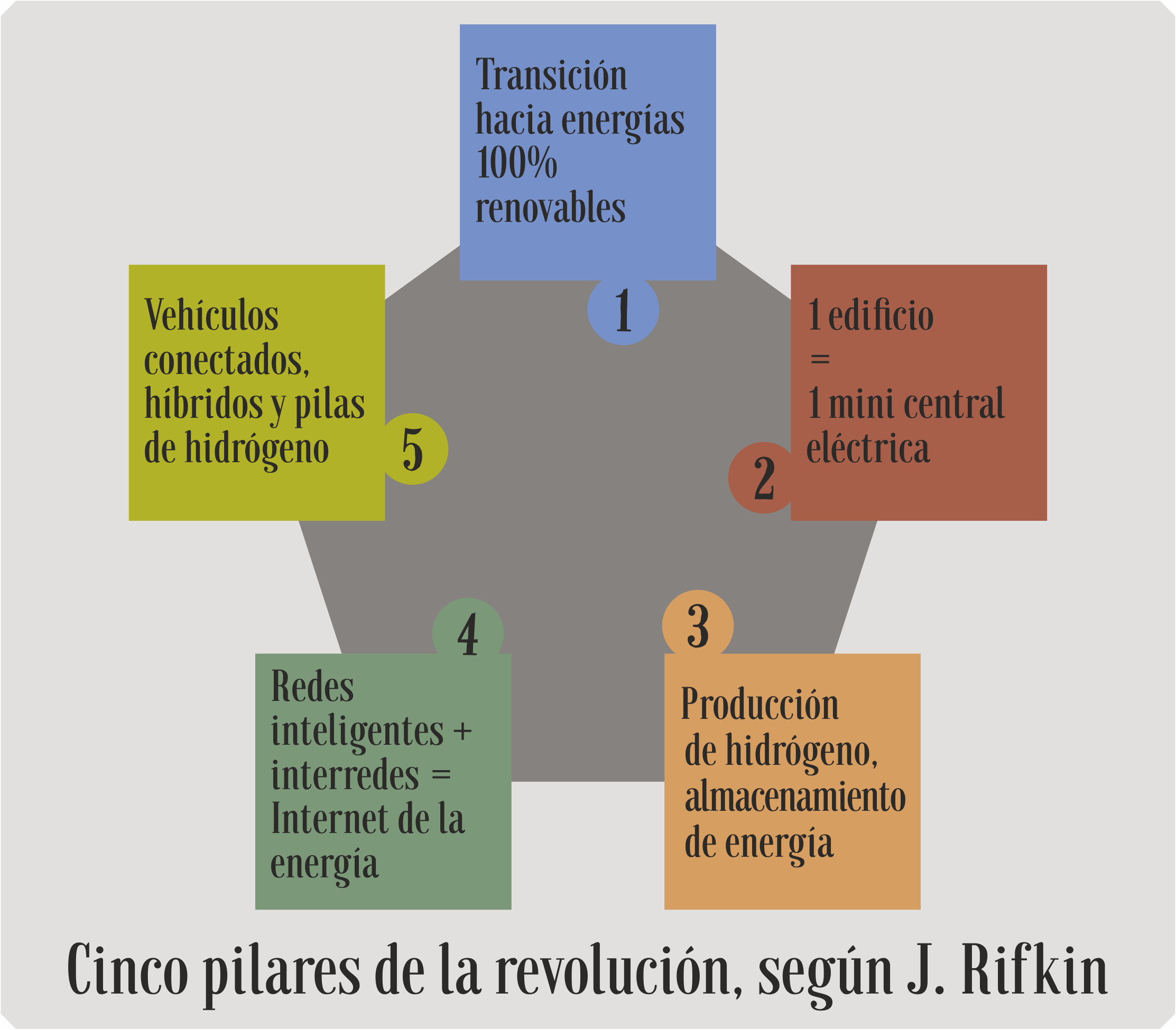 Gráfico en Español para Cinco pilares de la revolución de Jeremy Rifkin, para reemplazar el texto en Francés.